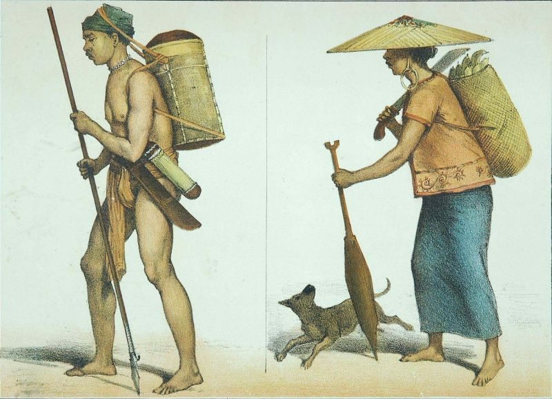 Litho. Carl Bock maakte in 1879 en 1880 een reis in Oost- en Zuid-Borneo, van Koetei naar Banjermasin. Over zijn ervaringen heeft hij een boek gemaakt.. Kleurenlitho's getiteld "Orang-Boekit uit de Afdeeling Amoentai" en "Dajaksche vrouw uit Longwai, van haar werk huiswaarts keerend"